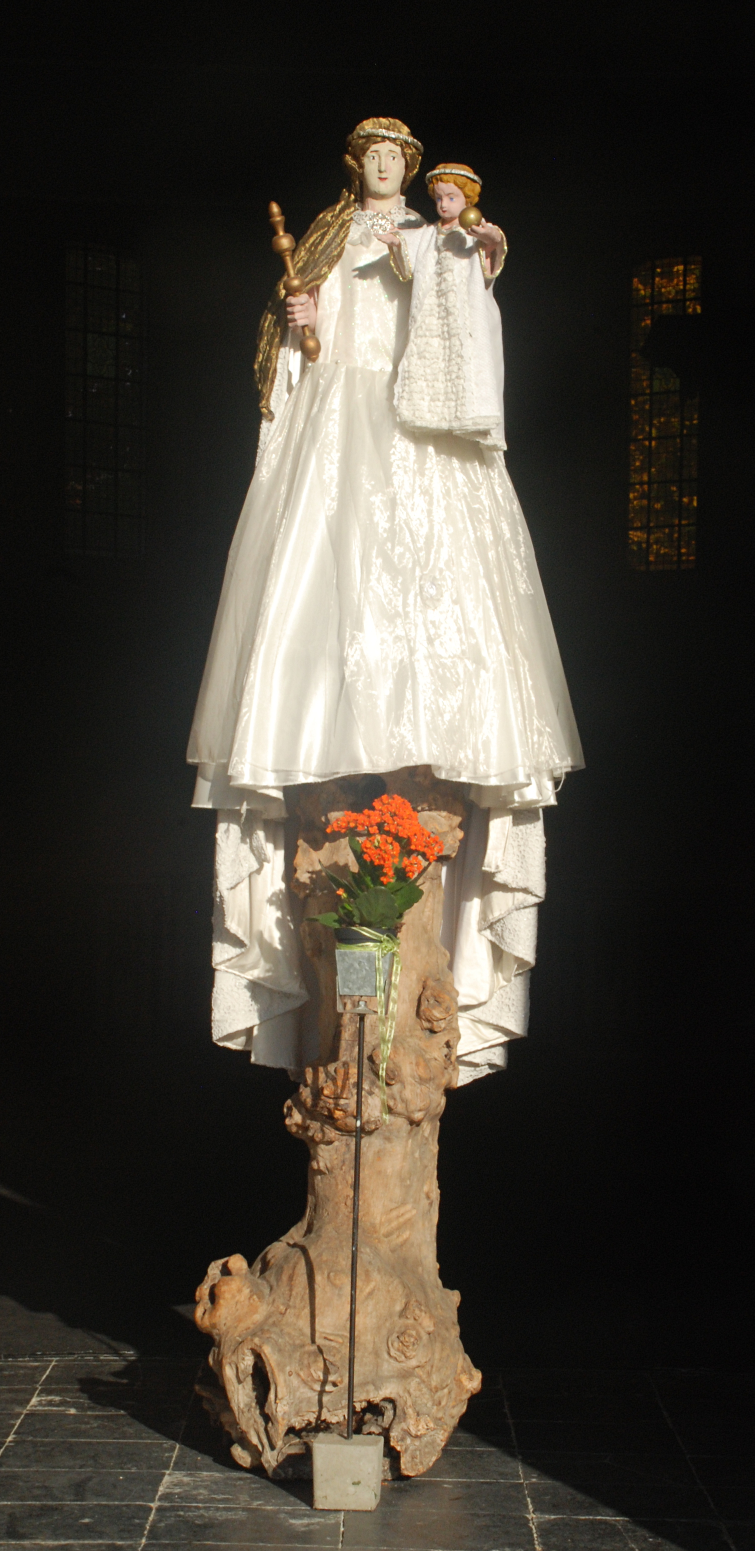 Belgique - Brabant wallon - Court-Saint-Étienne - Église Saint-Étienne - la Vierge en 2014